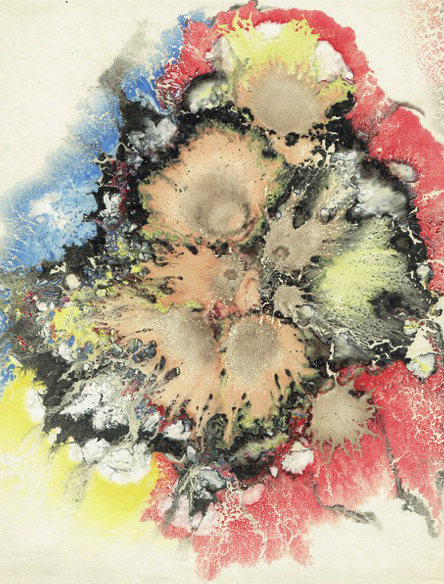 MIKHAIL MIKHAILOVICH TARKHANOV - untitled - 1934.